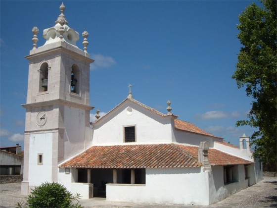 Igreja de São João Degolado